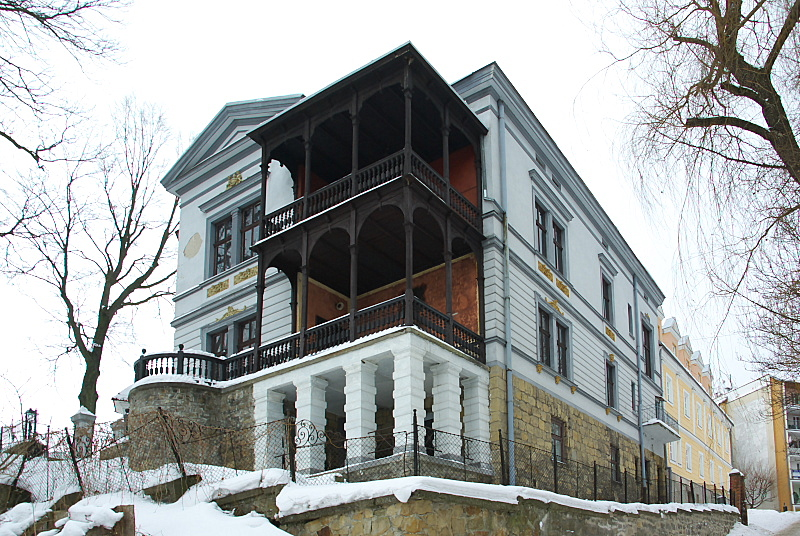 Dom Zaleskich zima 2012